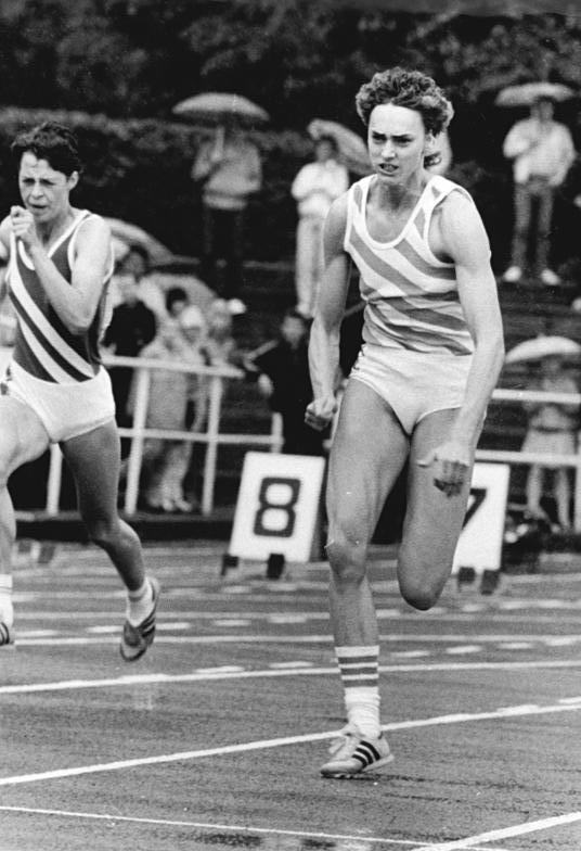 Heike Drechsler ADN-ZB Oberst 6.6.87-wo-Potsdam: Leichtathletik-WM-Qualifikation- Trotz des widrigen Wetters kam die Jenaerin Heike Drechsler am 5.6.87 im 100-m-Vorlauf der Frauen mit 10,99 s als erste Frau in dieser Saison unter die 11-s-Grenze.